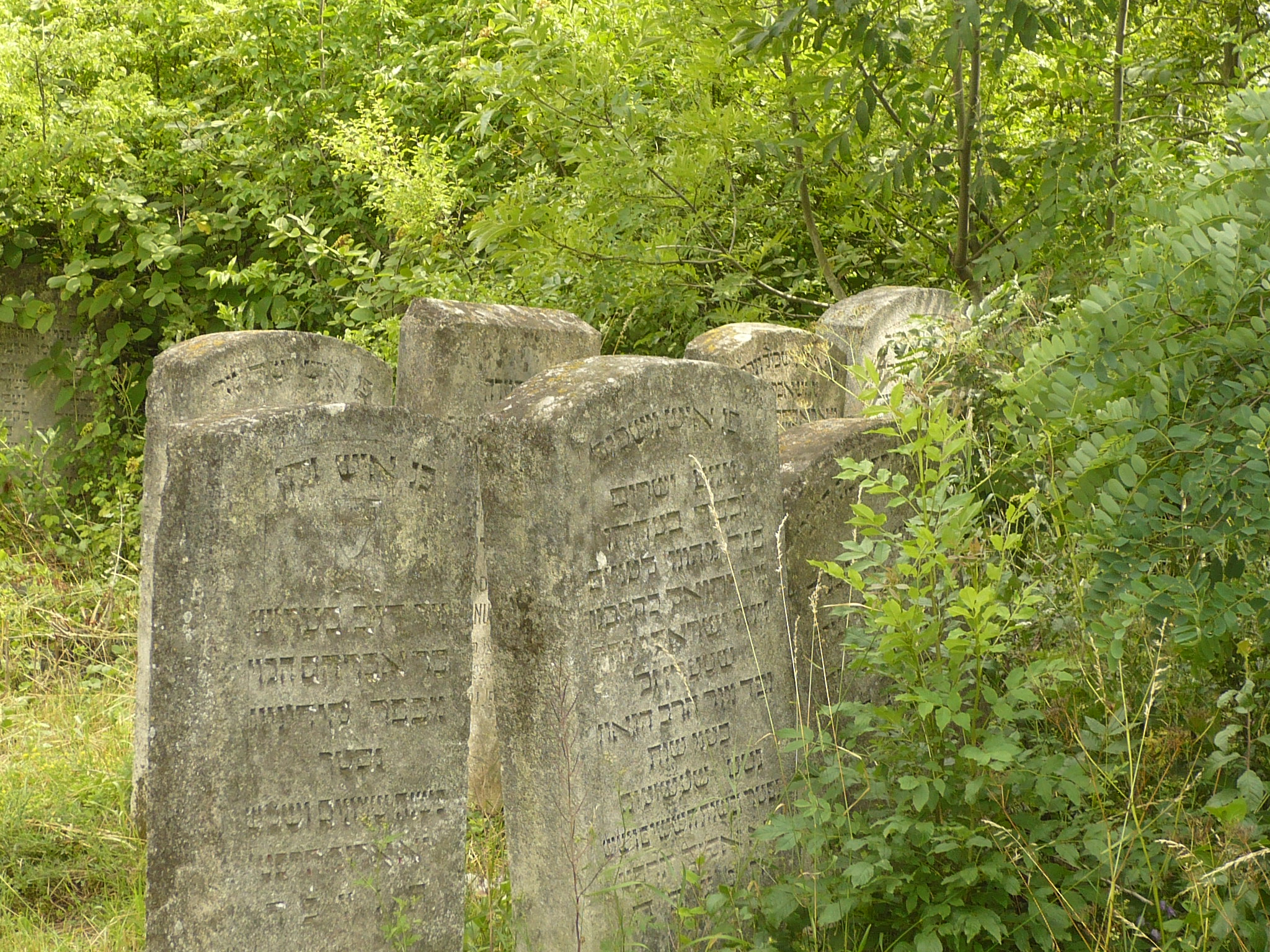 Buczacz.Kirkut